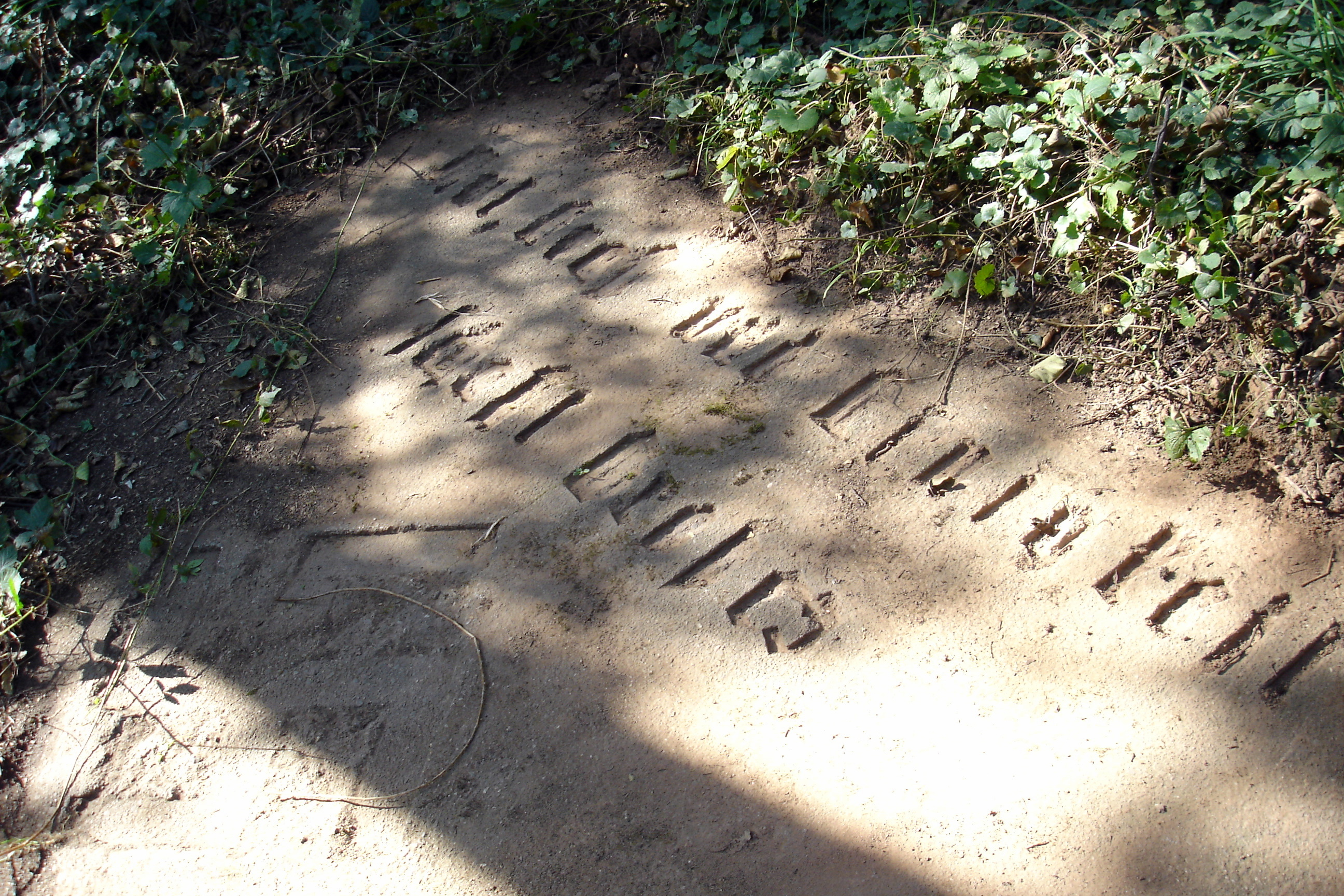 Diefflen, überwucherter Gedenkstein zur Primsregulierung der 1930er Jahre, Inschrift: "Mut, Kraft und Einigkeit schafft Großes", darunter das Hakenkreuz